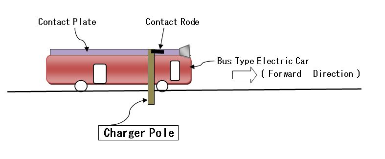 ポールにより給電する装置